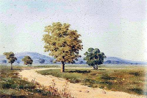 Landscape